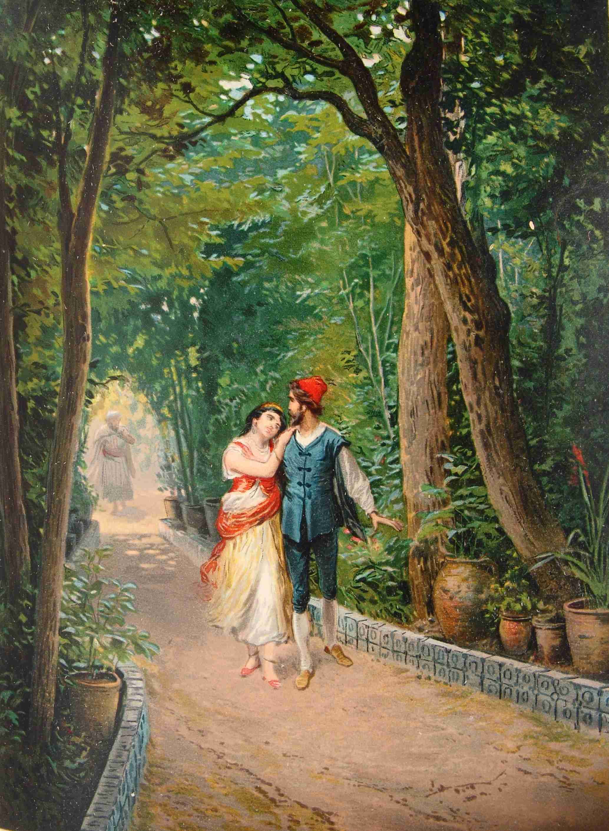 202_104_quijote_cap41